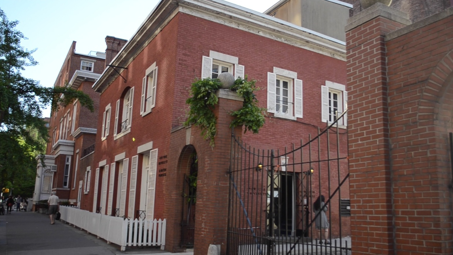 La Maison française, New York Egyetem, Manhattan